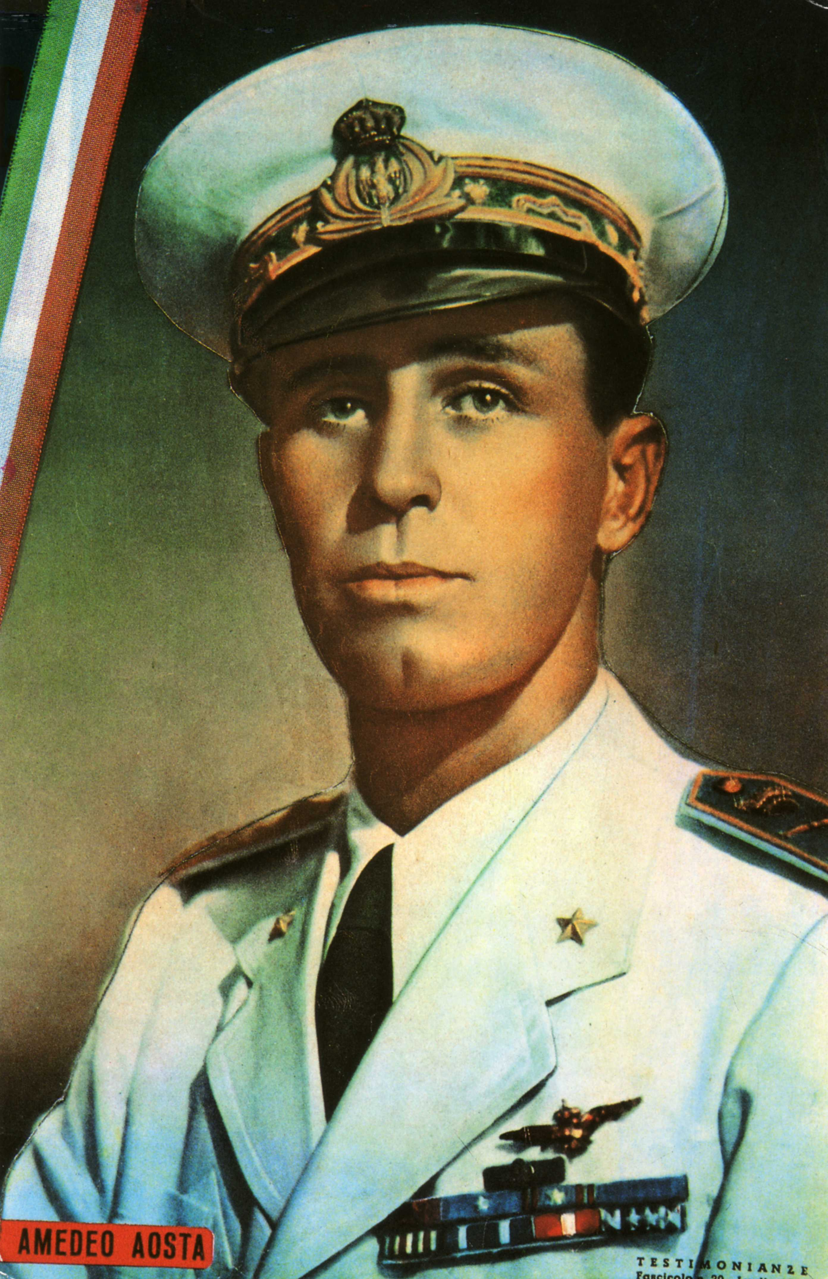 Amedeo di Savoia-Aosta (1898-1942)